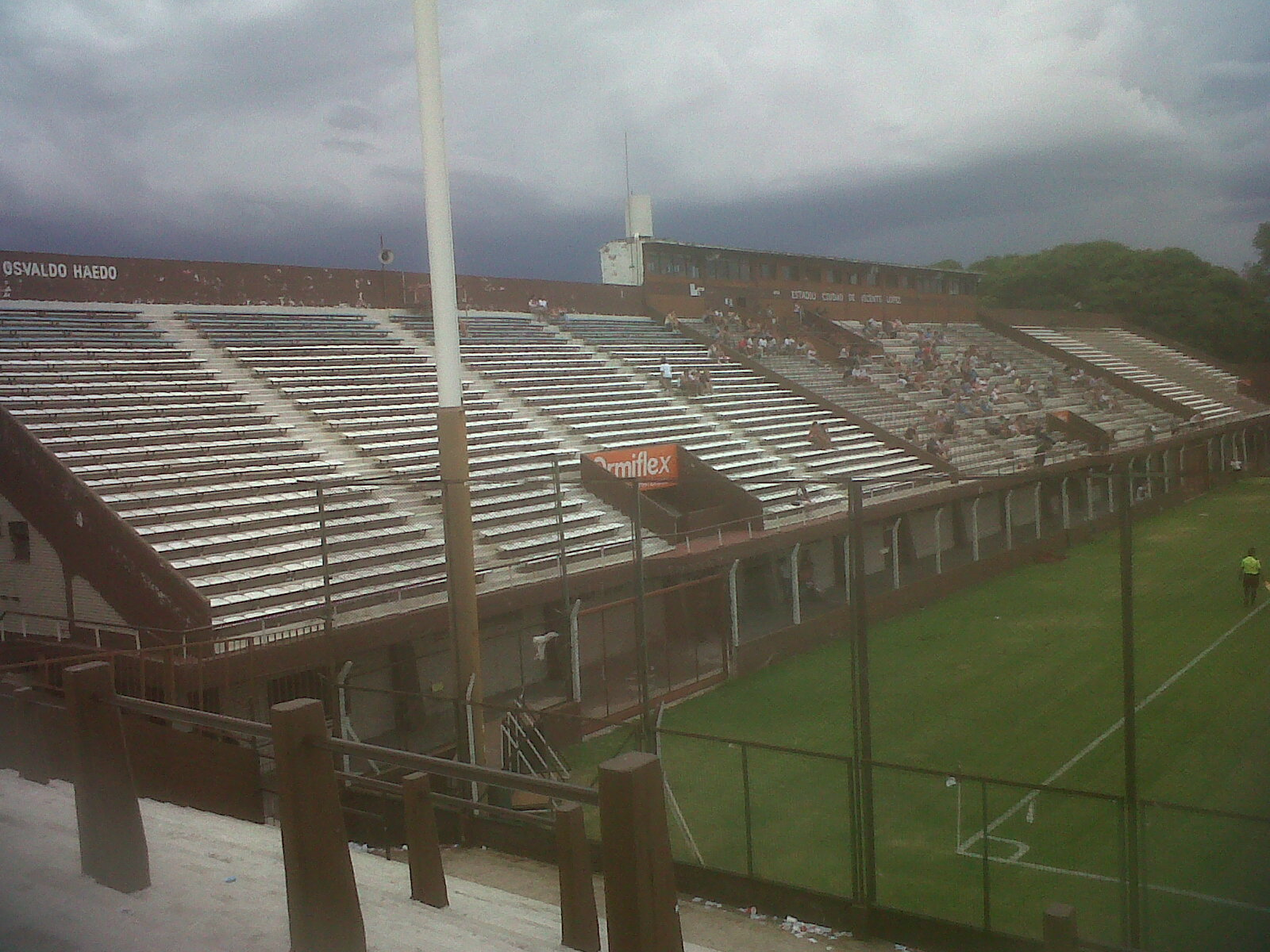 Platea del Ciudad de Vicente Lopez